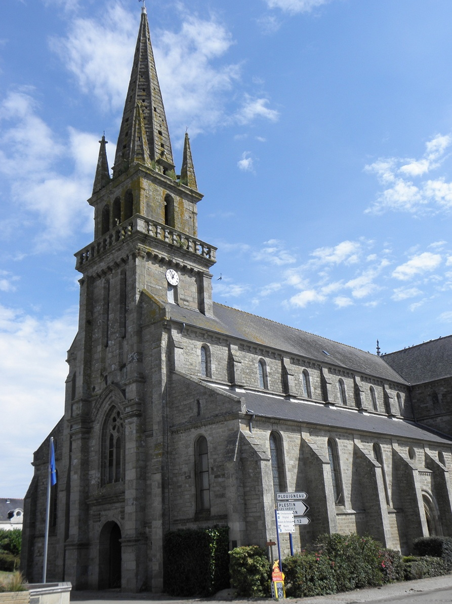 Façade occidentale de l'église Saint-Mélar de Lanmeur (29). .